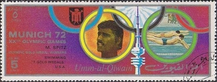 Mark Spitz